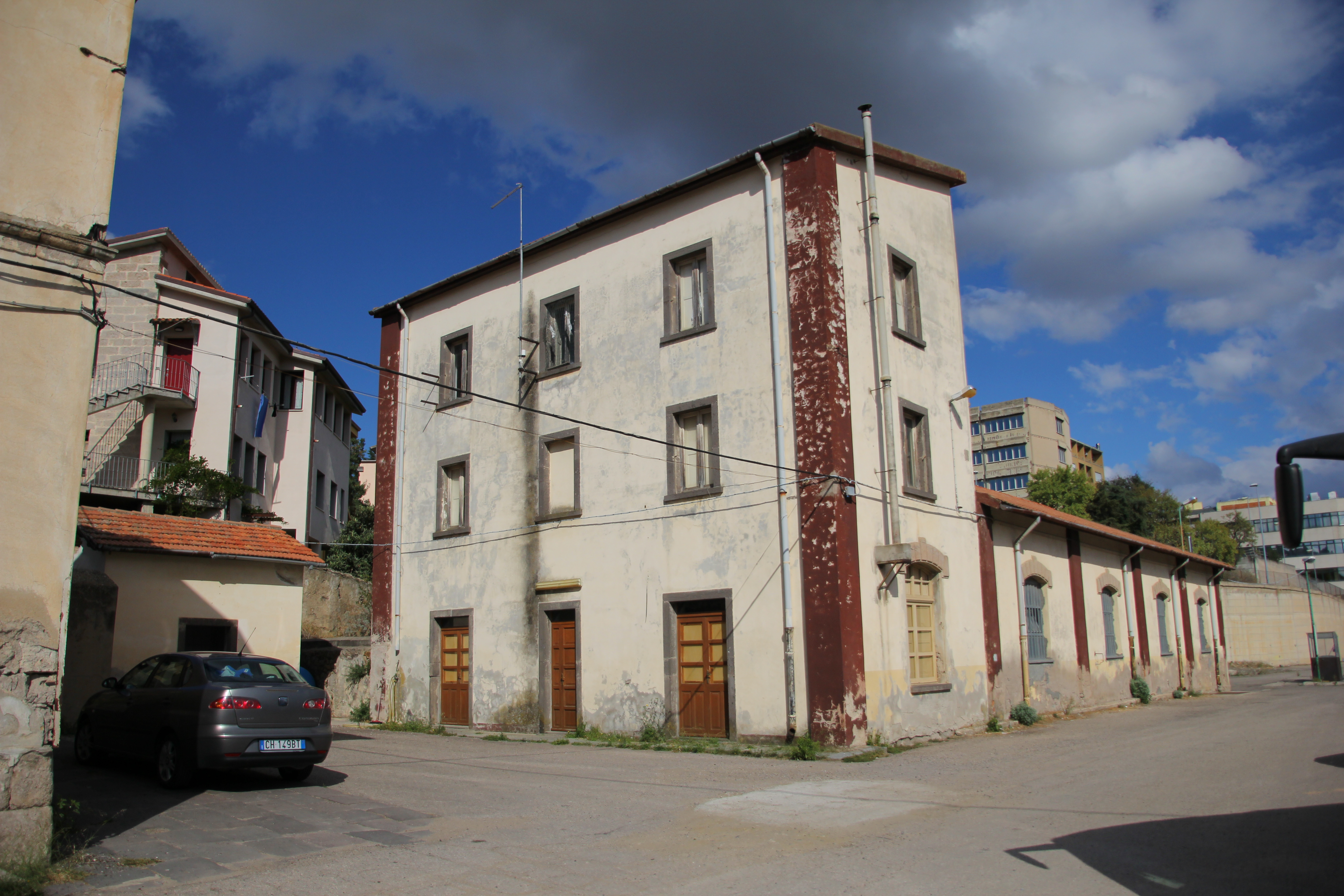 Ozieri - La vecchia stazione ferroviaria